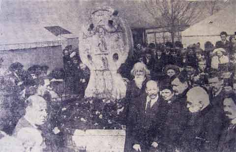 Фотография с открытия памятника Римскому-Корсакову. На церемонии присутствовали Глазунов А. К; Габель С. И; Ирецкая Н. А; Лавров Н. С; Соколов Н. А; Штейнбер М. О; Архангельский А. А; вдова композитора и много учеников. Фотография опубликована в «Петроградской газете» 01 мая (18 апреля) 1912 года